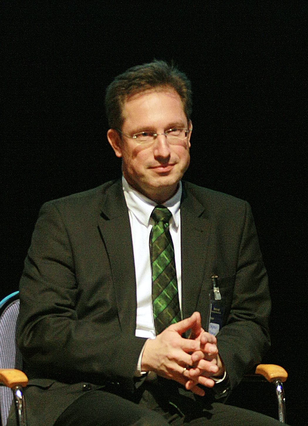 Stephan Thomae, Rechtsanwalt und Politiker (FDP), seit 2009 Abgeordneter im Deutschen Bundestag